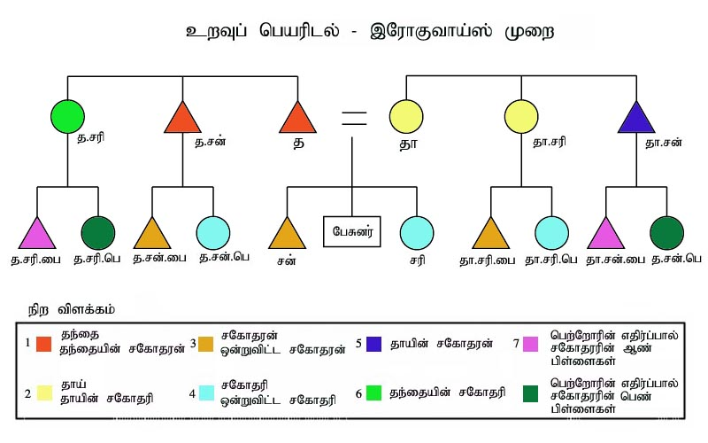 Drawn by the user who uploaded it here. பகுப்பு:தமிழில் விளக்க வரைபடங்கள்